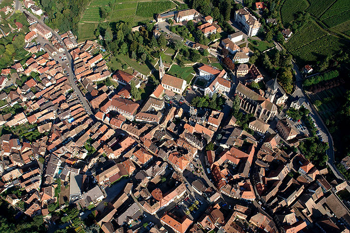 Photo aérienne de Ribeauvillé